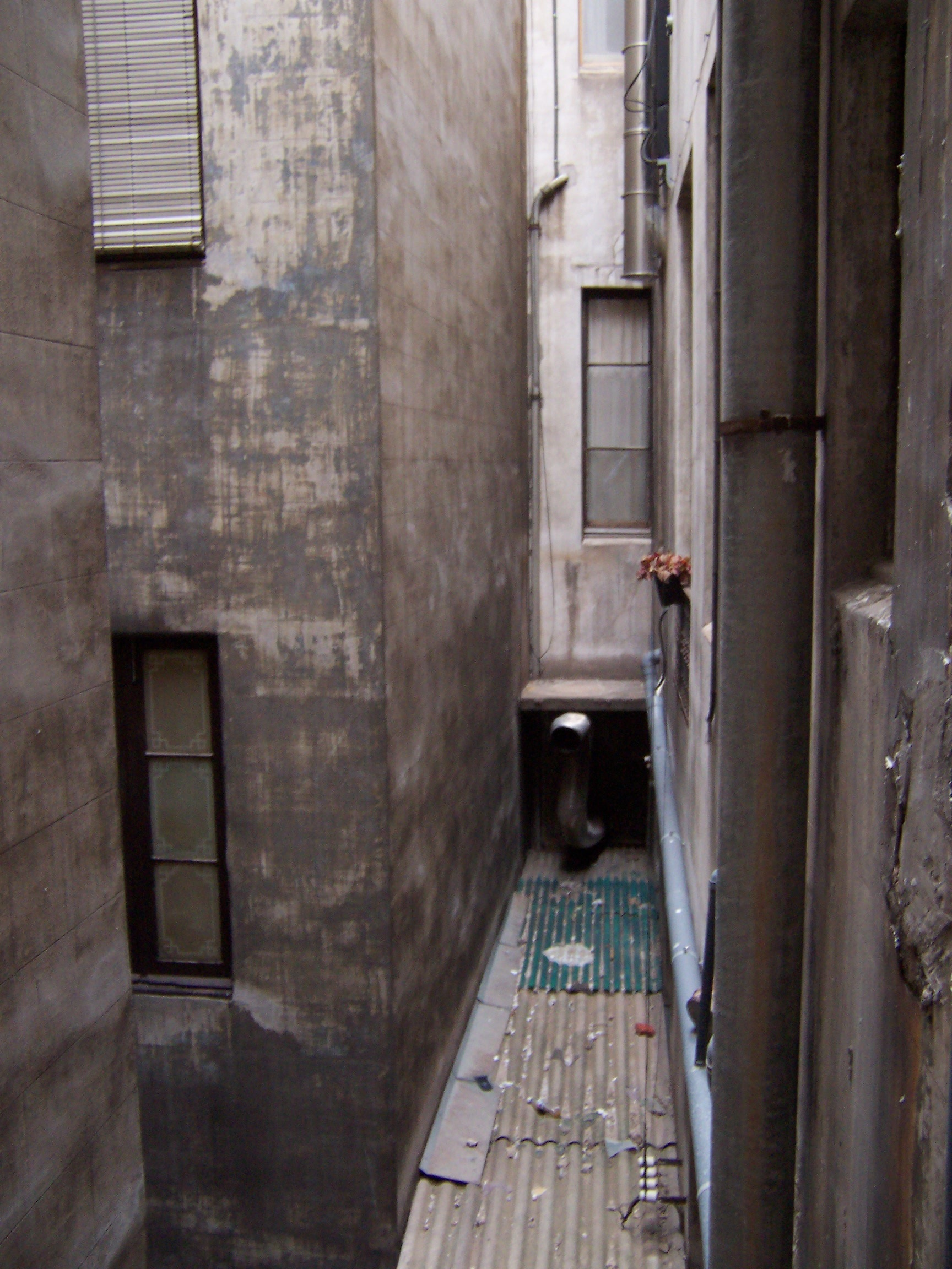 Innenhof einer Mietskaserne in Barcelona